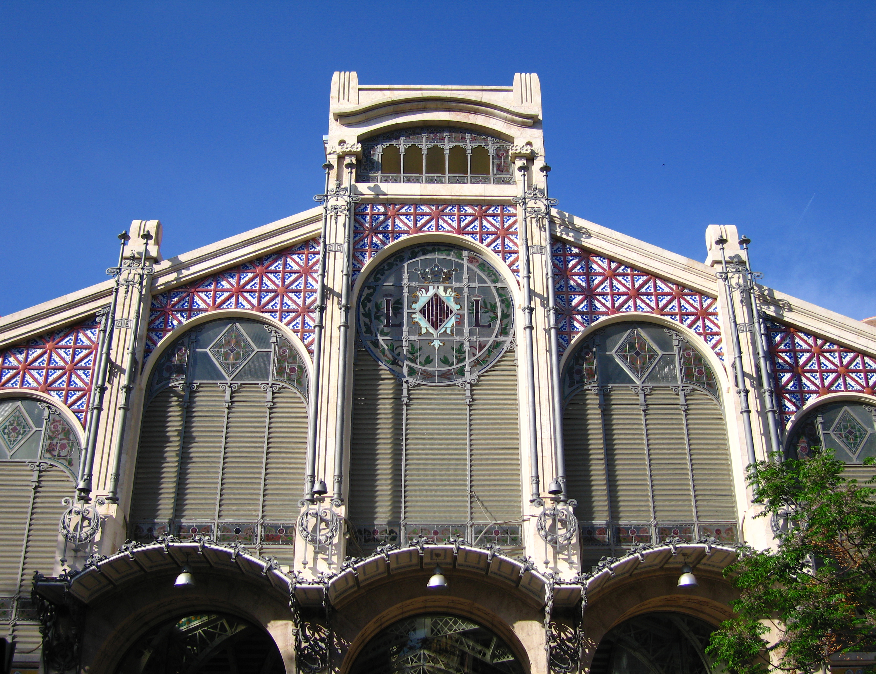 Detall de la façana del mercat central de València